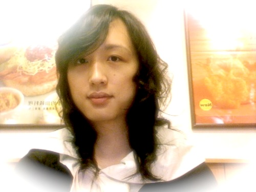 Self-taken photo. Bân-lâm-gú: Tông Hōng. 唐鳳